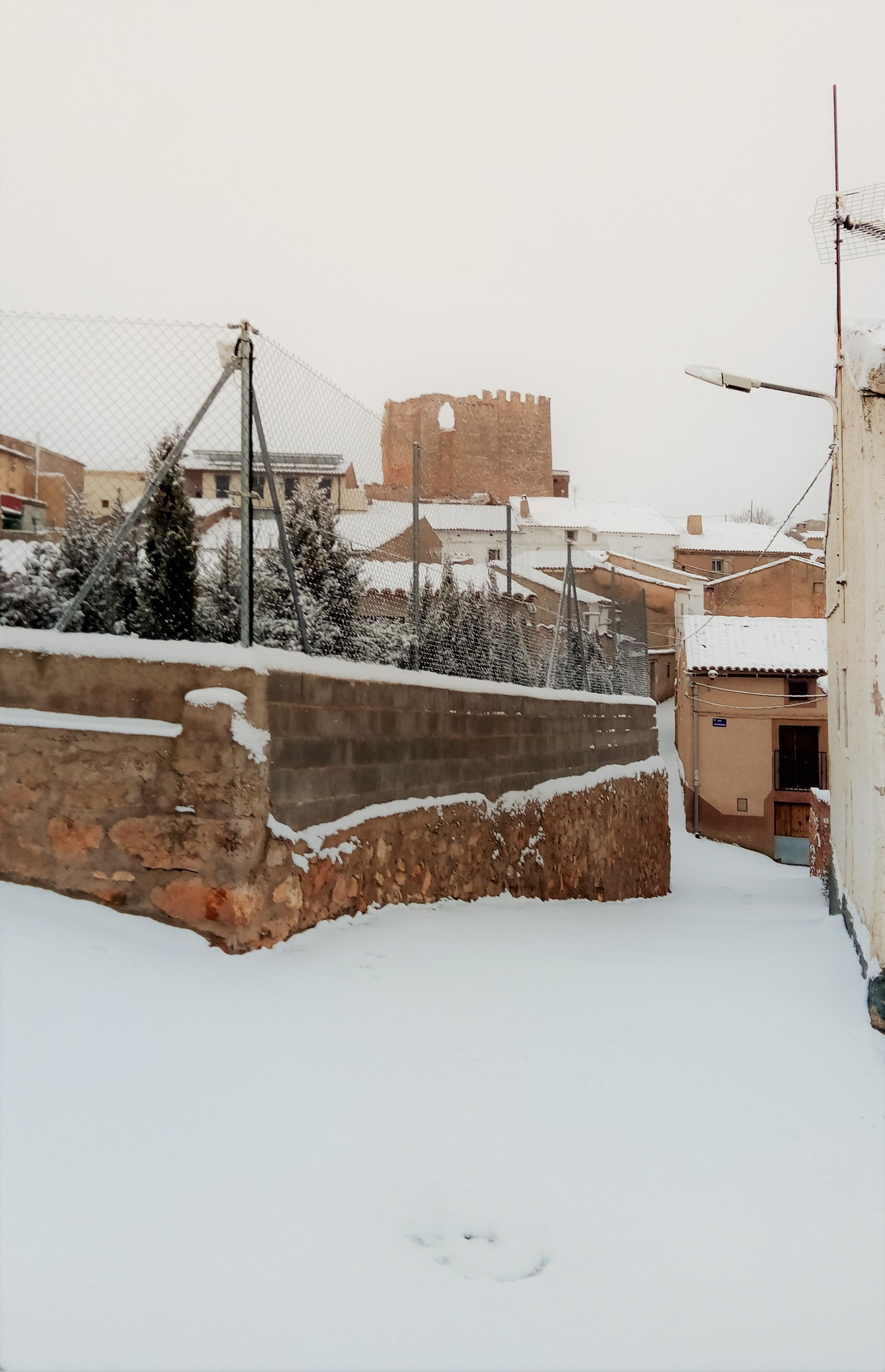 El pueblo de Sisamón durante la nevada del año 2020.